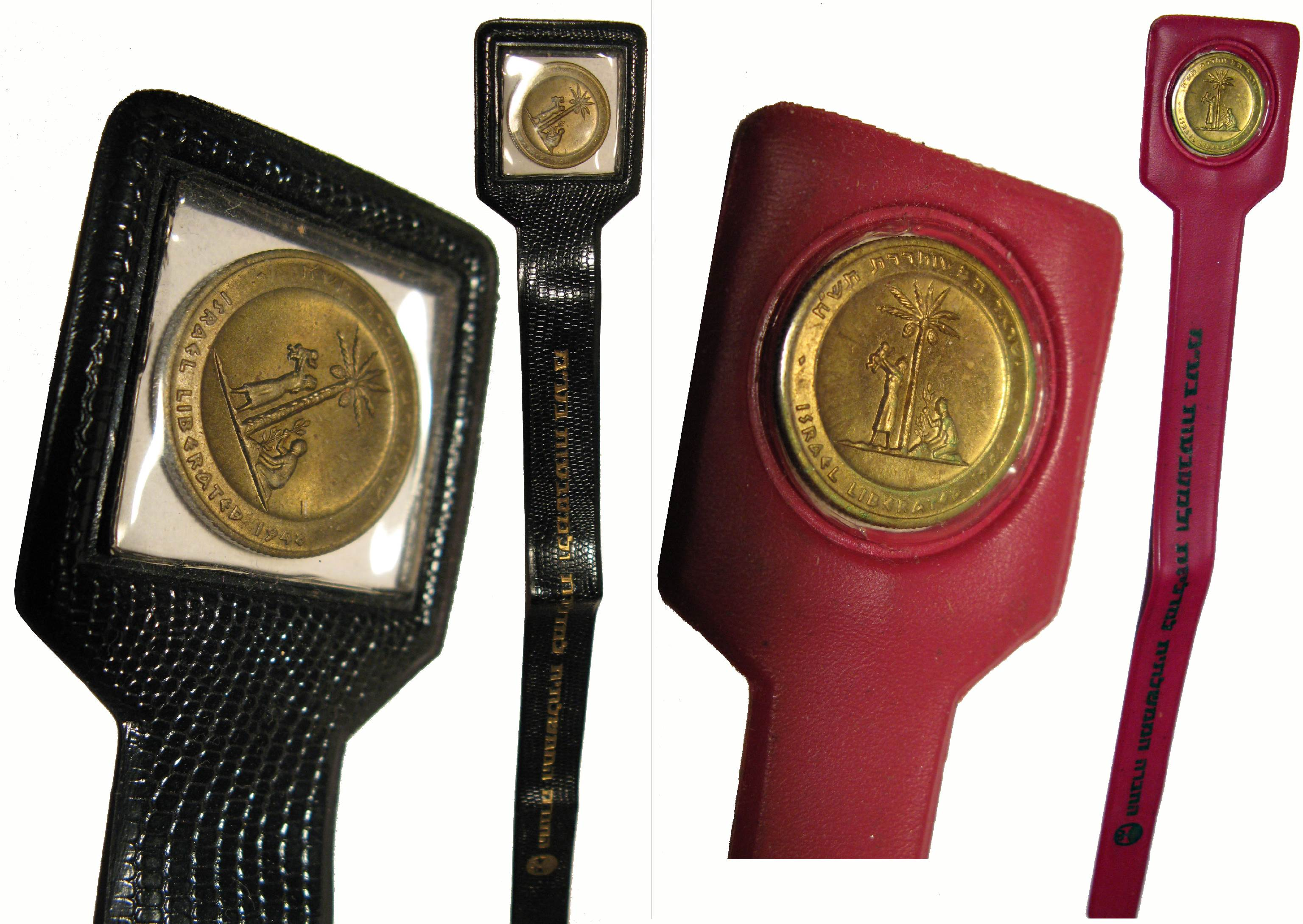 מדליית שחרור דור ג' - סימניות